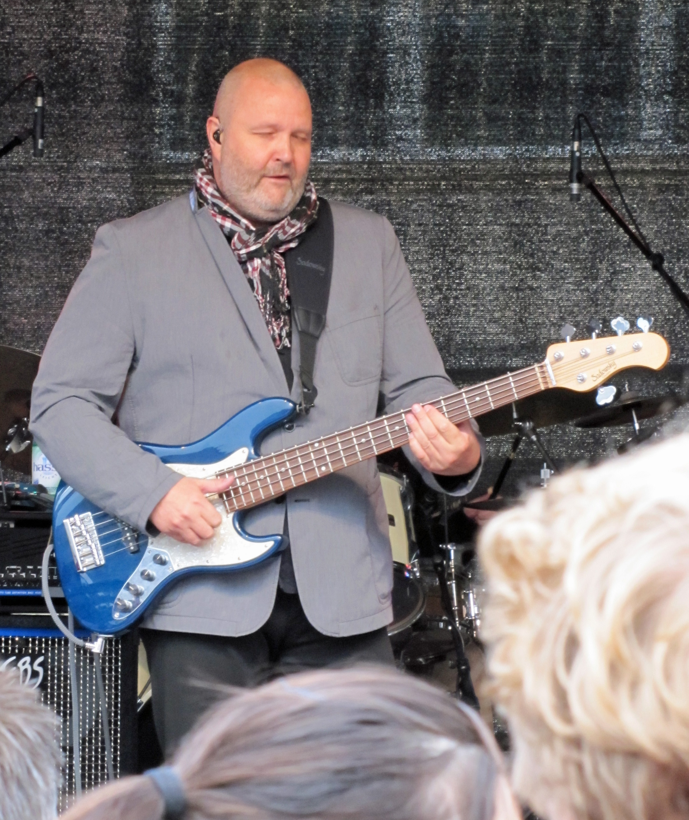 Johann Asmundsson (Bass) von Mezzoforte, 2012 bei Jazz zum Dritten auf dem Römerberg in Ffm.